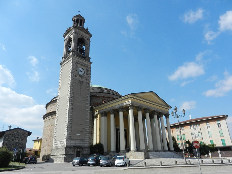 Ghisalba - Chiesa Parrocchiale di S. Lorenzo